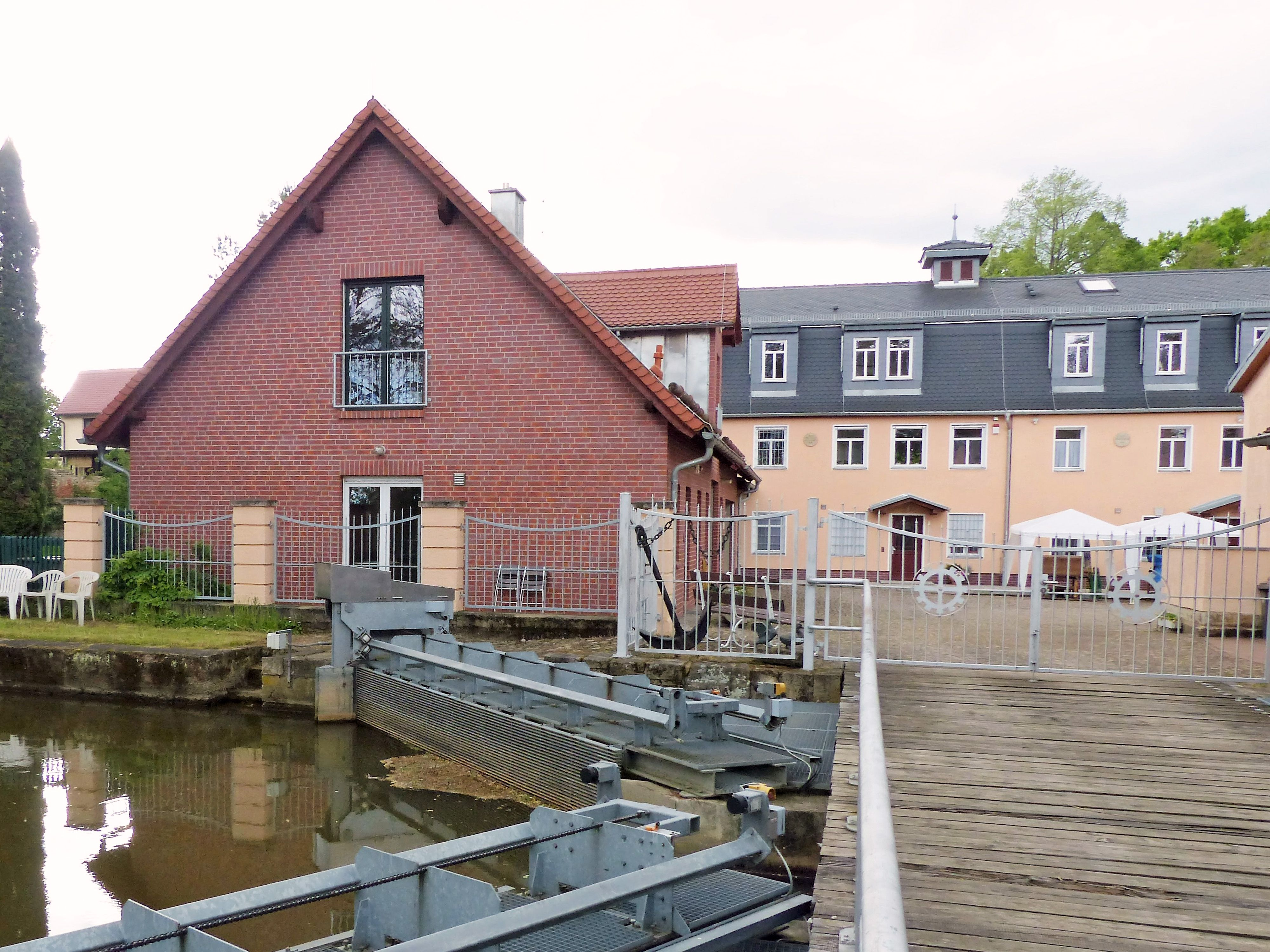 Eisenmühle Oderwitz, Wohngebäude: Neues Haus (vorn) und Altes Haus